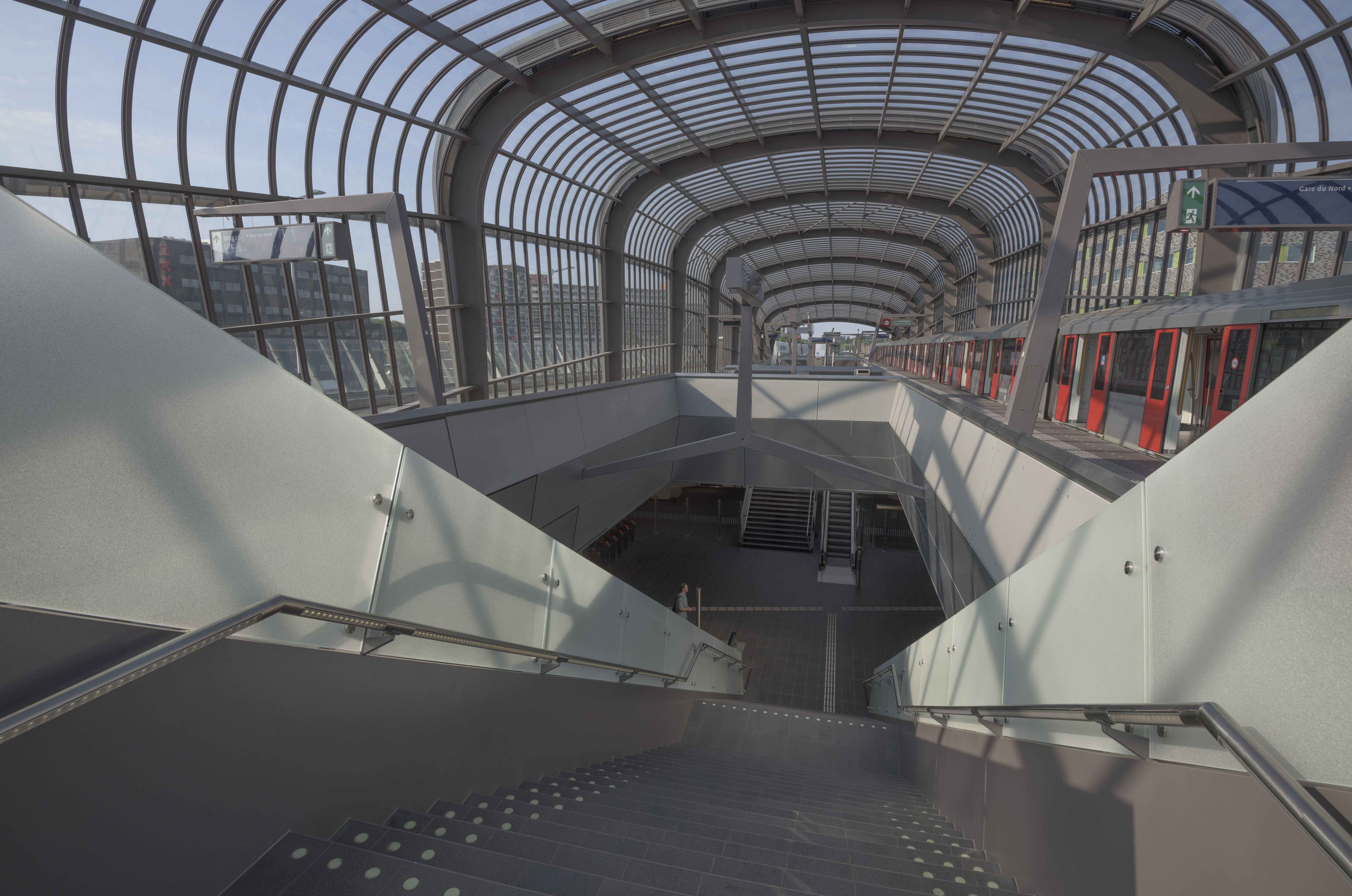 Metrostation Noord van de NoordZuid lijn.